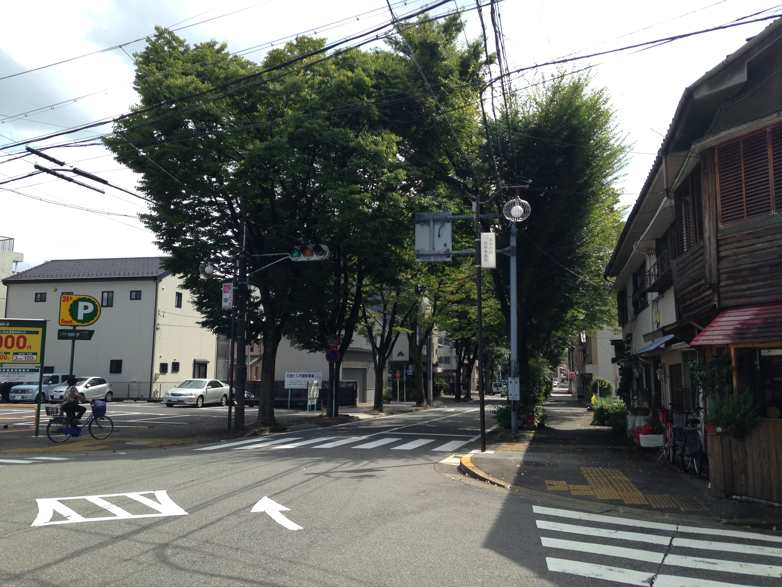 城西一交差点より南側を望む